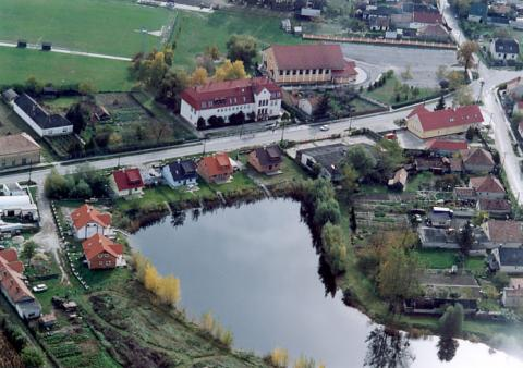 Ásványráró légifotója, Tó a Rákóczi utca és a Nefelejts utca közötti területen. Iskola (Fehér épület)